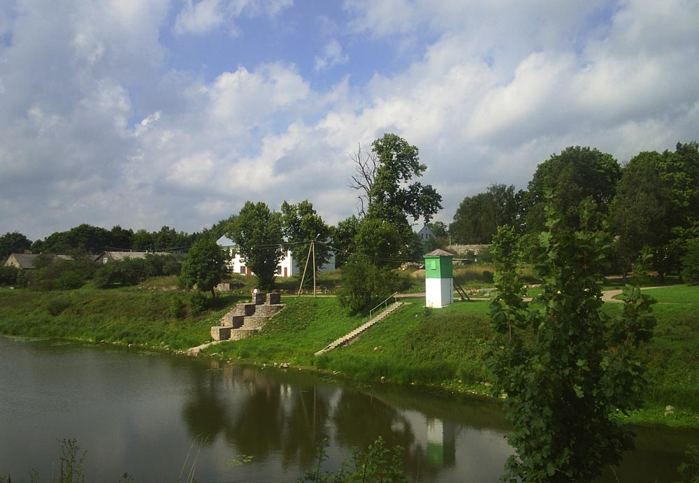 Smalininkų prieplauka